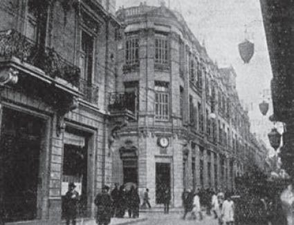 La primera sede del Centro Naval. Esquina de Corrientes y Reconquista, Buenos Aires.